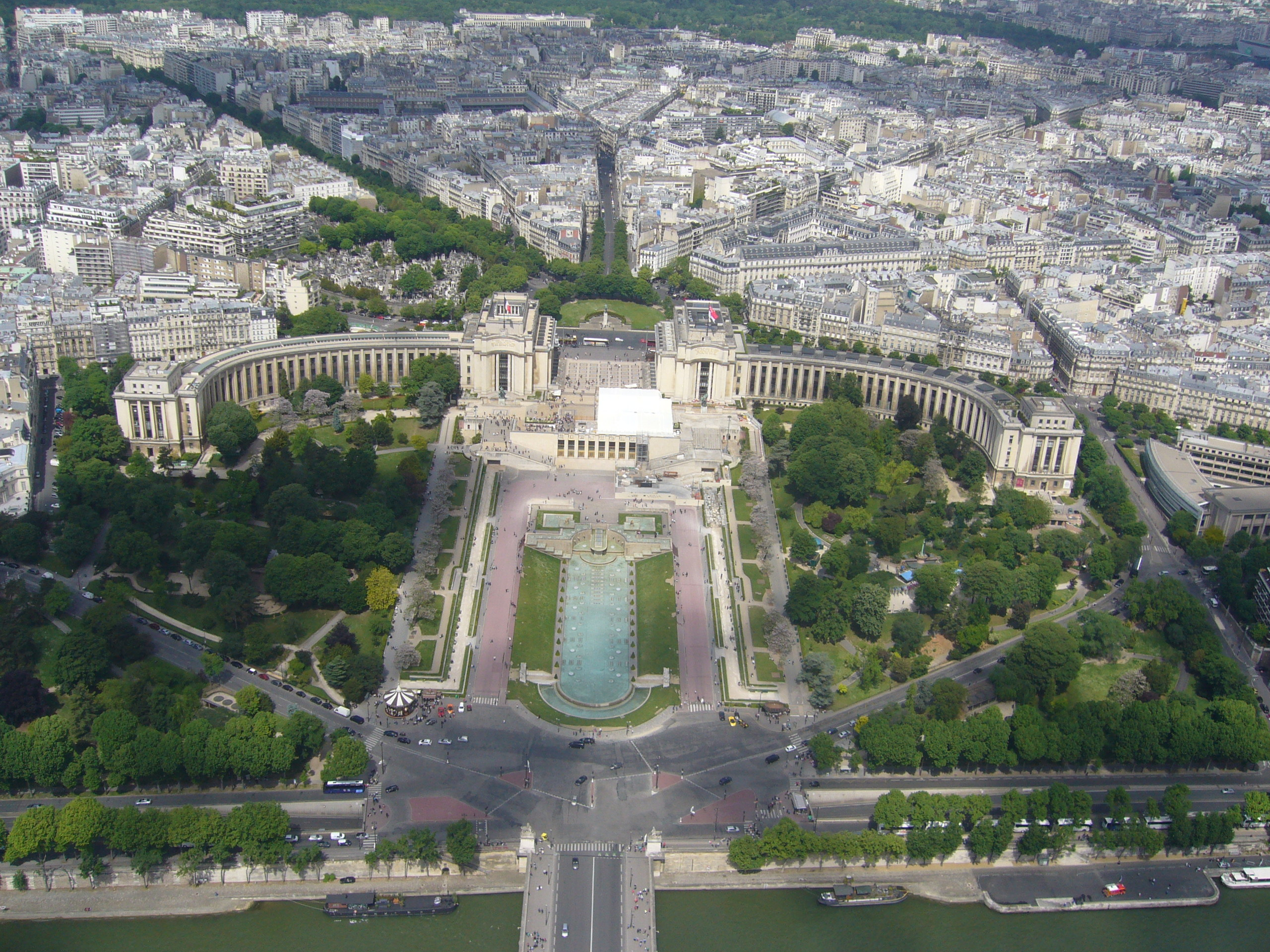 Vue du troisième étage de la Tour Effeil